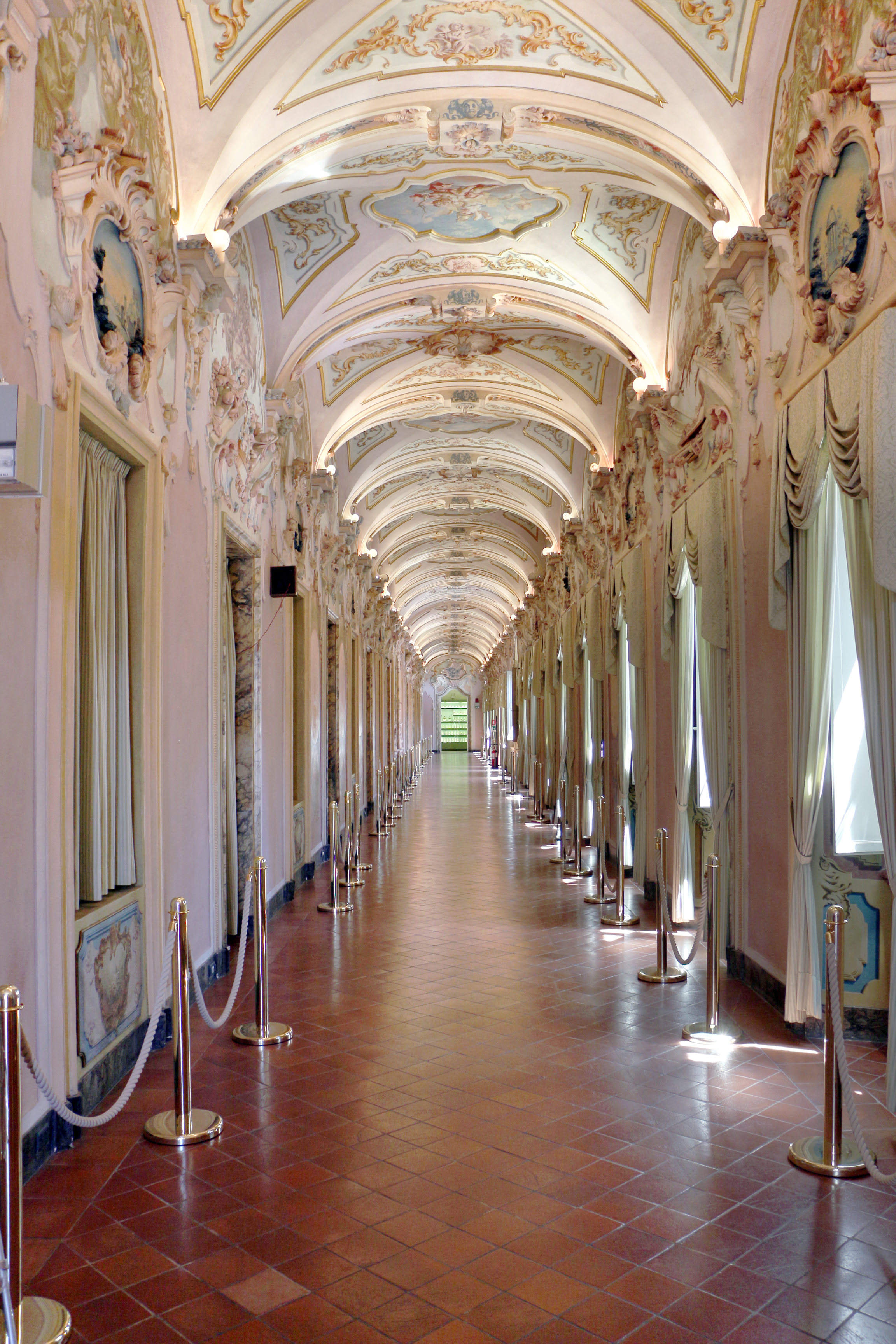 Pinacoteca Civica, Palazzo Pianetti This is a photo of a monument which is part of cultural heritage of Italy.